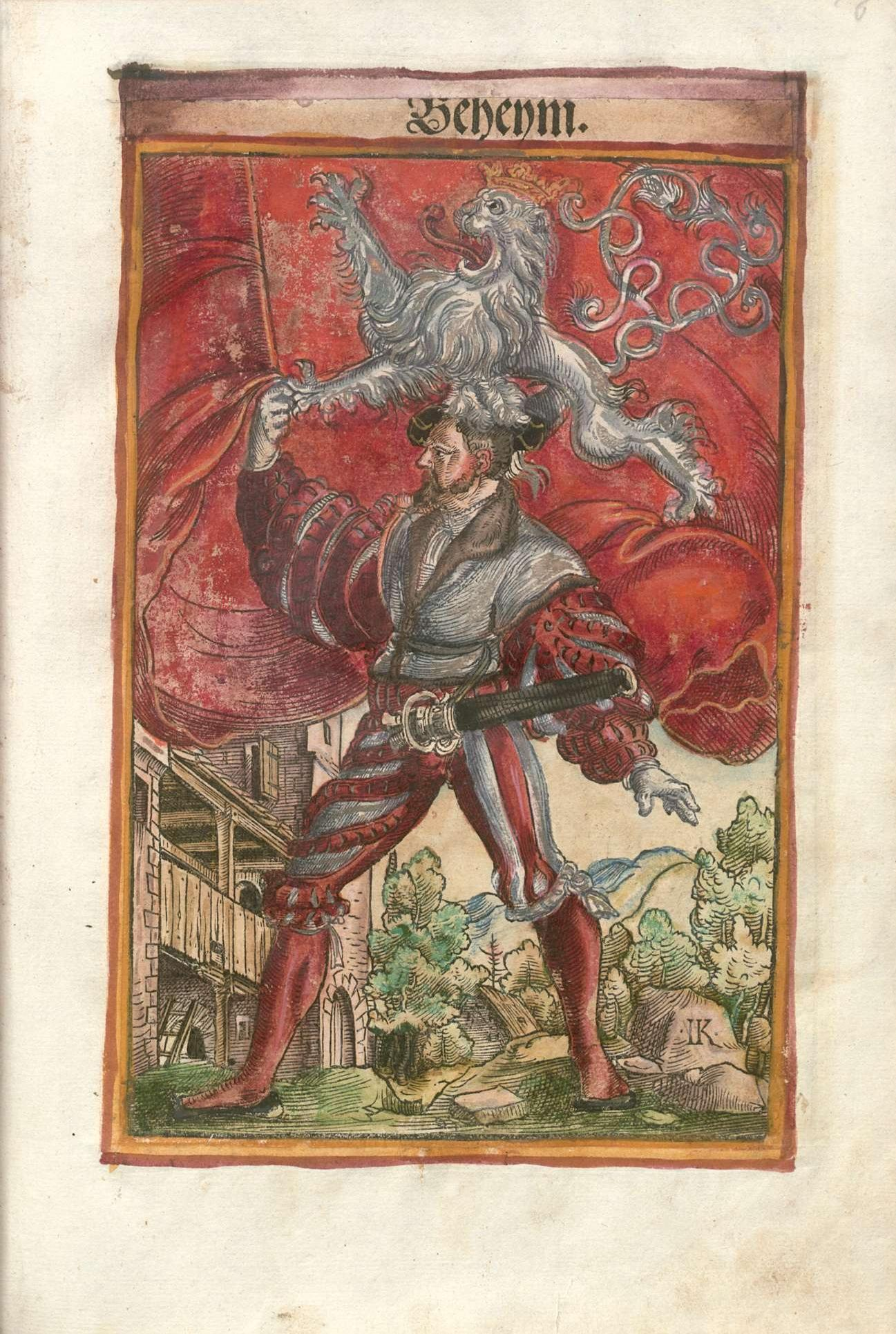 Wappen von Böhmen. Die historische böhmische Fahne. In: Koebel, Jacob: Wapen. Des heyligen Römischen Reichs Teutscher nation, Der Churfürsten Fürsten Grauen Freihen Rittern Auch der merer theil Stett ... Auch wie ... die erwölung vn[d] krönung eynes Römischen Künigs vnd Keysers geschehen soll. Mit einer erclerung ... wie ein jedes wapen gefärbt oder gemalt werden sol, Franckfurth am Main, 1545 [VD16 K 1623].